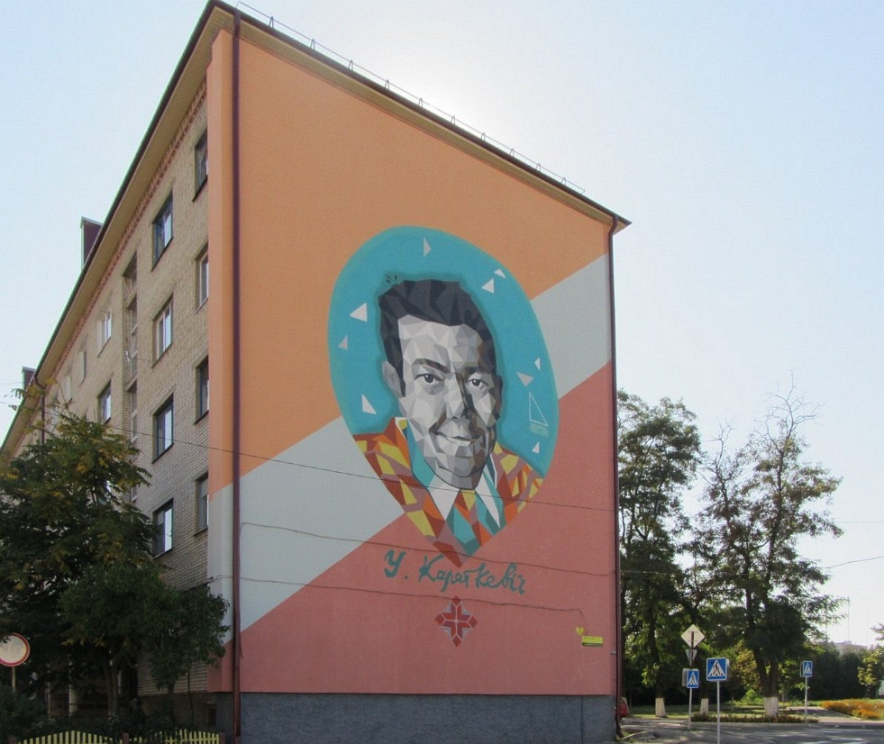 Рагачоў.